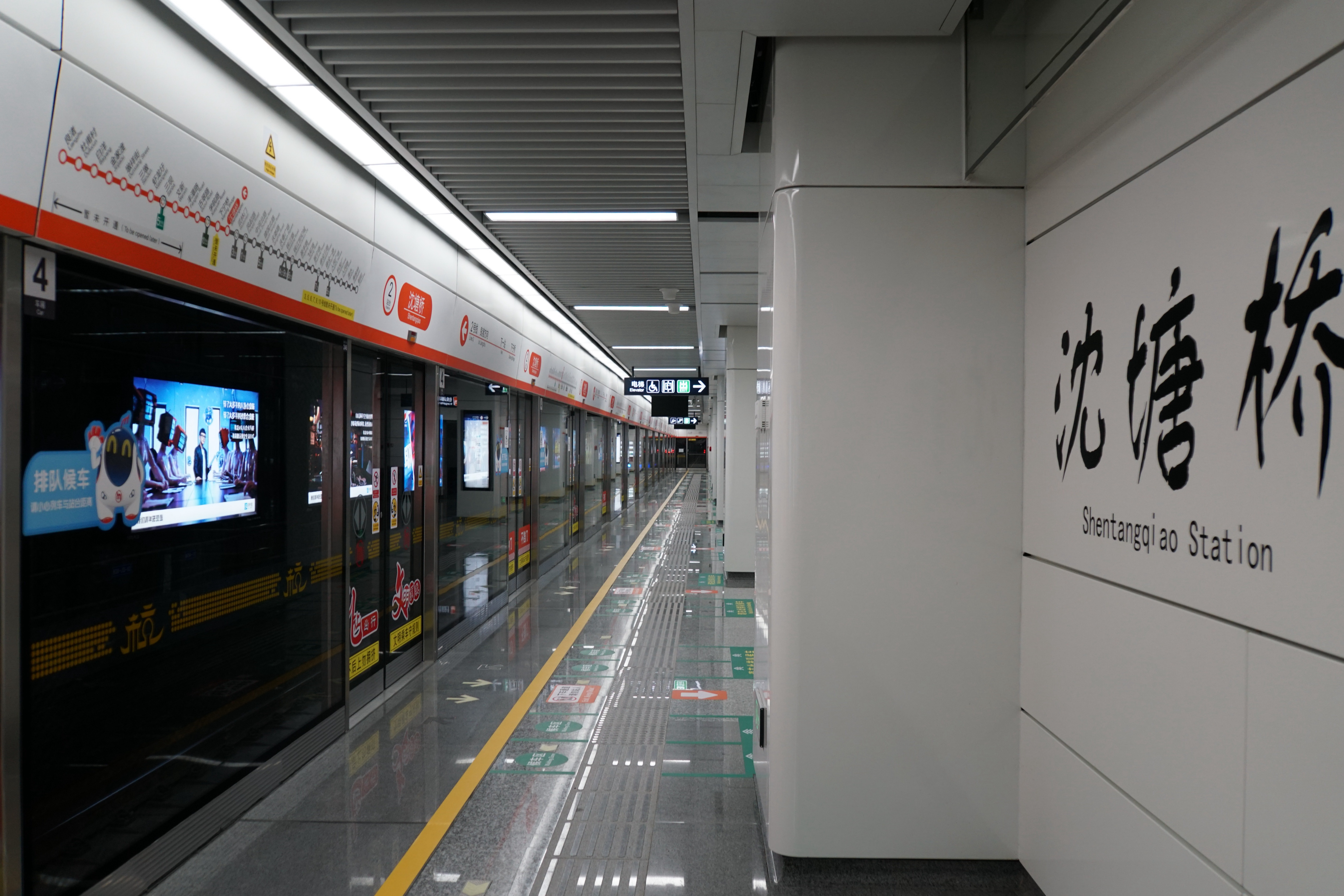 沈塘桥站站台与大字壁